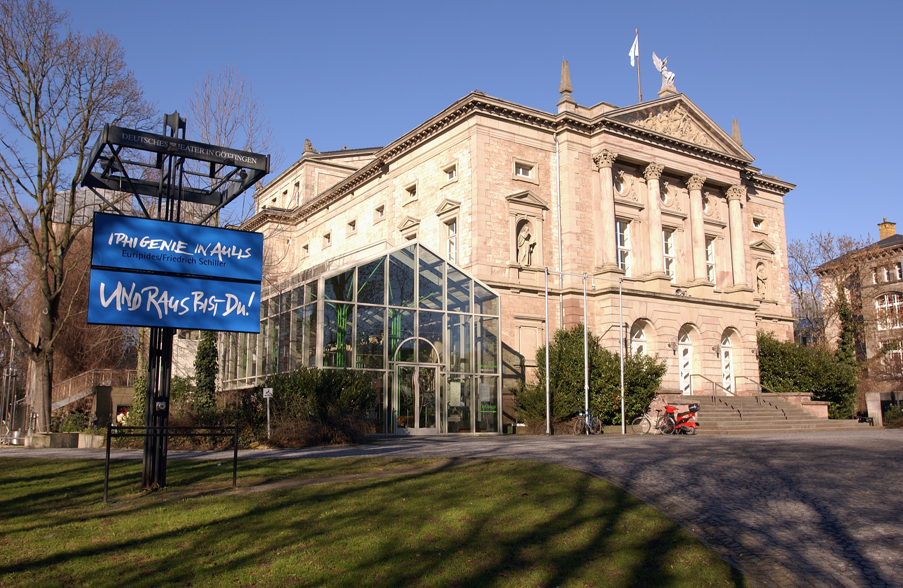 Goettingen, Deutsches Theater